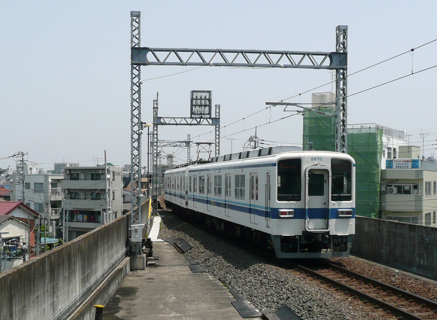 大師前駅から西新井駅へ向かう東武大師線の電車